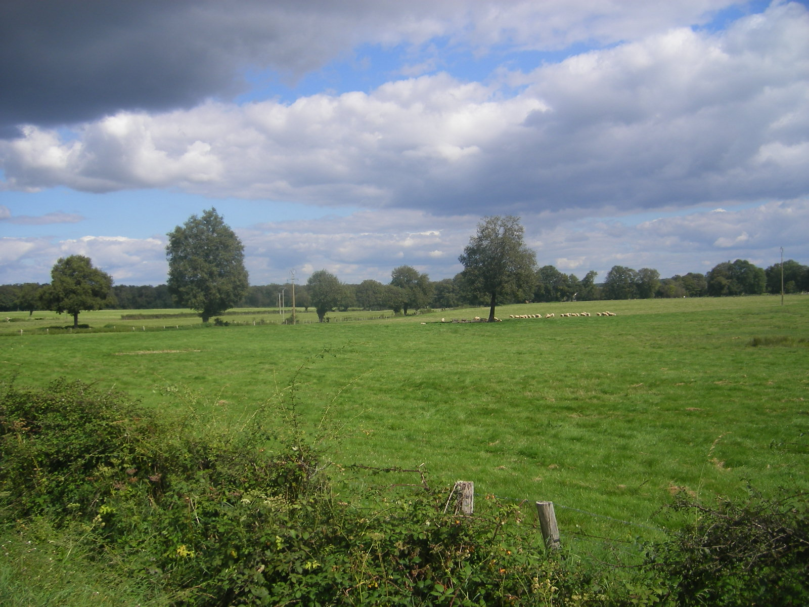 Landscape of Bourbonnais near Gennetines (Allier, Auvergne, Fr)